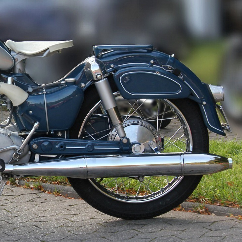 NSU Supermax, Baujahr 1957, bei der Moselschiefer-Classic in Mayen